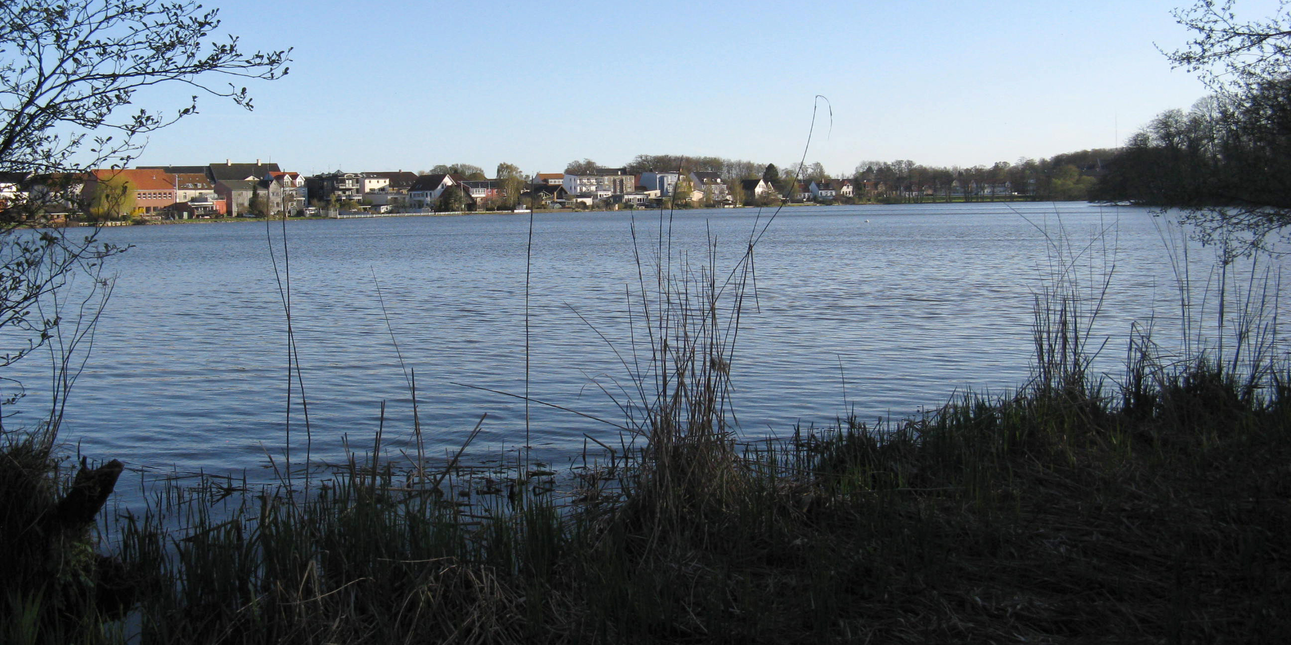 Gråsten Slotssø set fra slottet